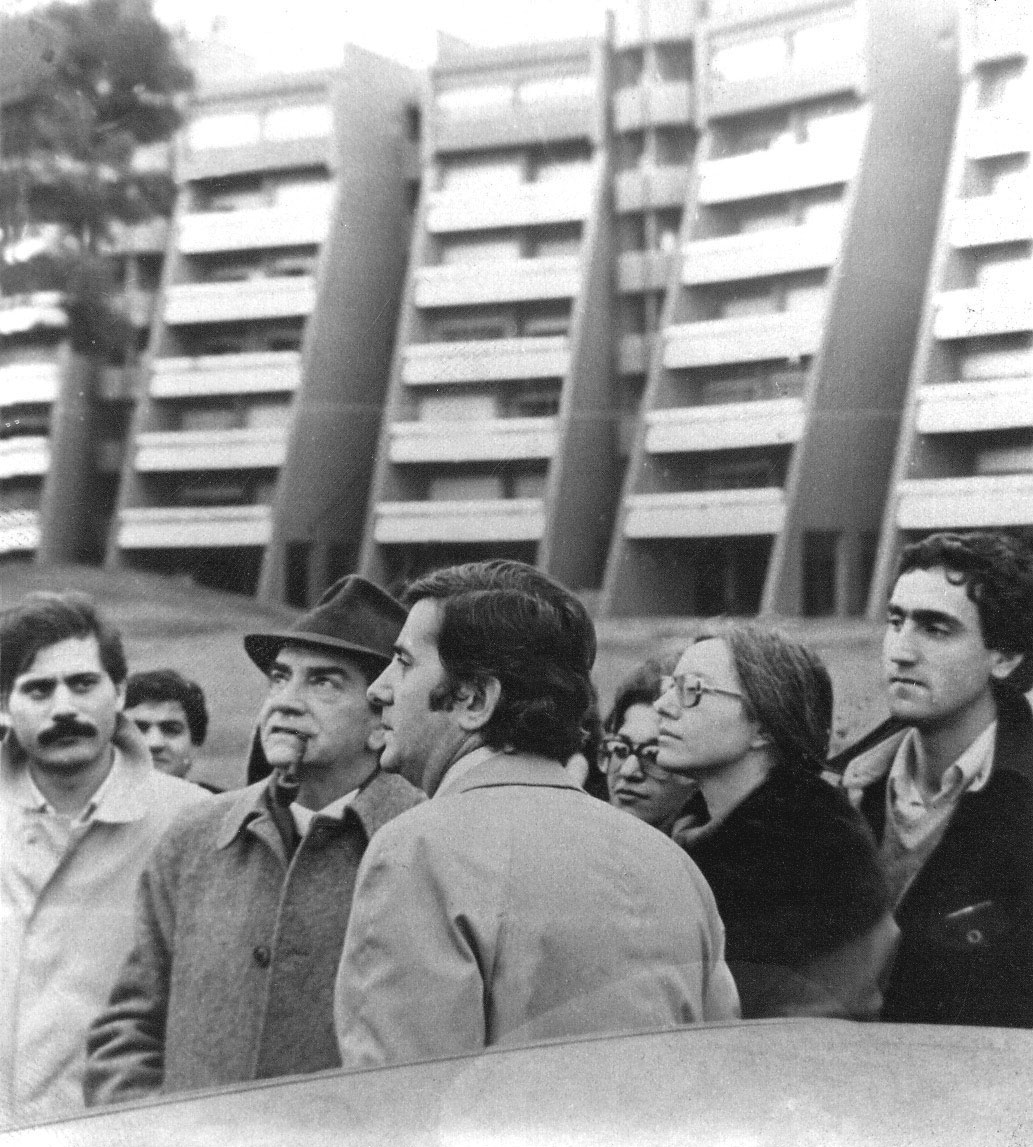 Gianfranco Moneta presenta Vigna Murata a Bruno Zevi alla presenza di studenti di Architettura.